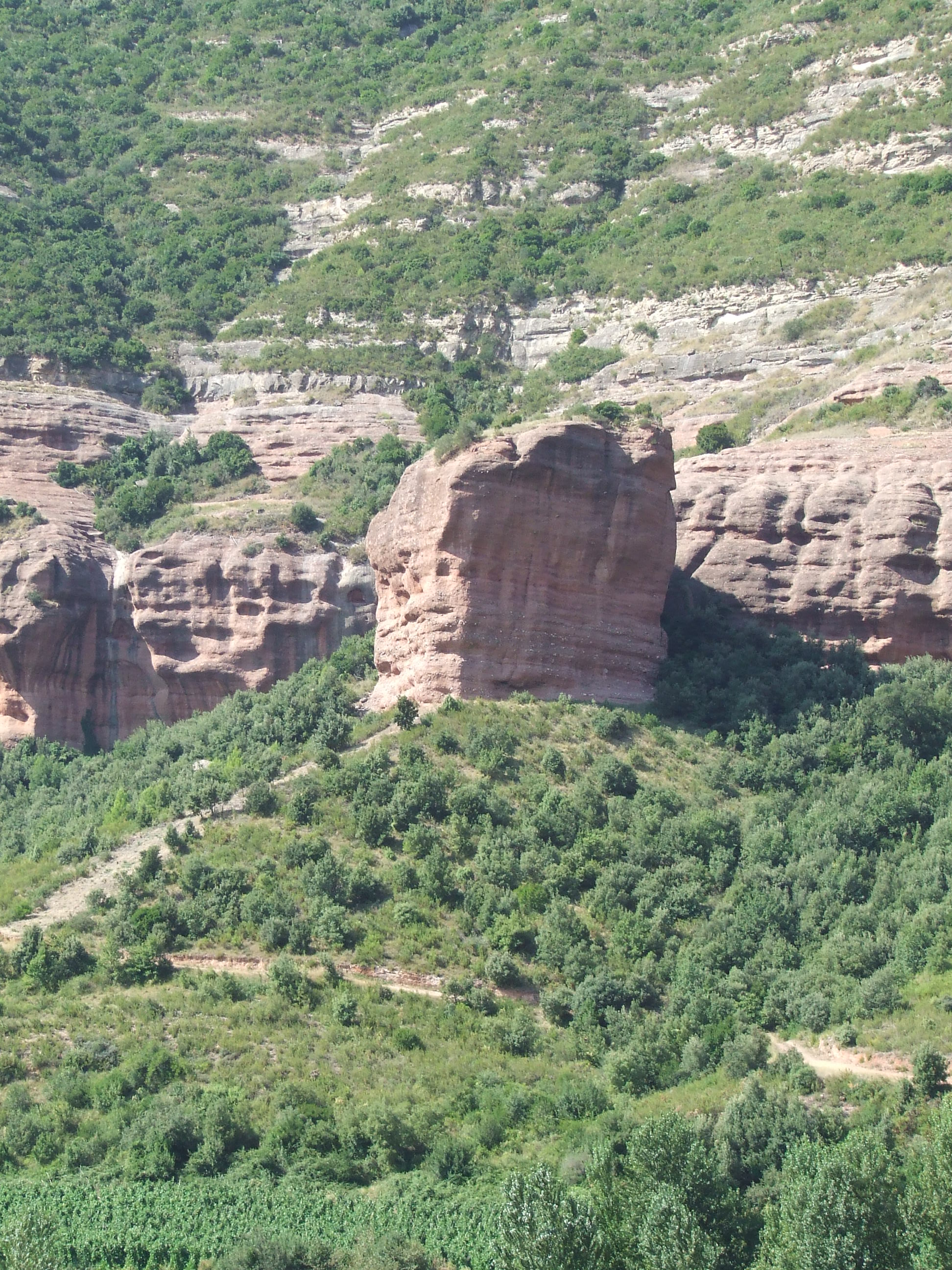 La Roca Rodona (Riells del Fai, Bigues i Riells, Vallès Oriental)